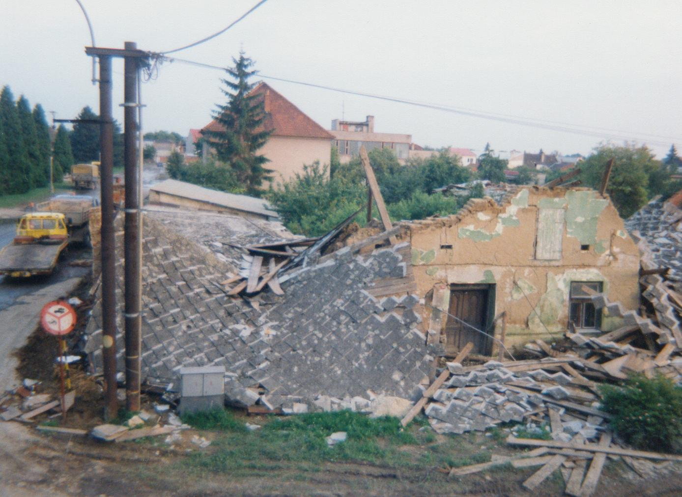 Troubky po povodni 1997